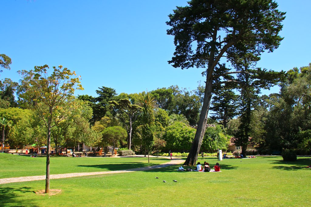 Costa do Estoril Cascais, station balnéaire sur la costa do Estoril à 25 km de Lisbonne